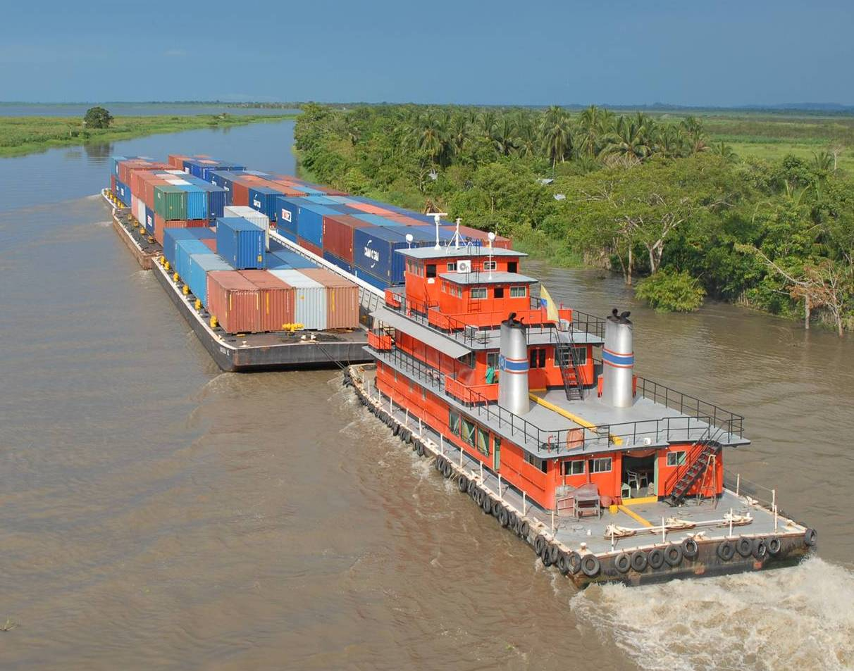 Remolcador Fluvial RR CATALINA, de la NAVIERA FUVIAL COLOMBIANA, navegando por el canal del Dique del Río magdalena, llevando convoy de barcazas